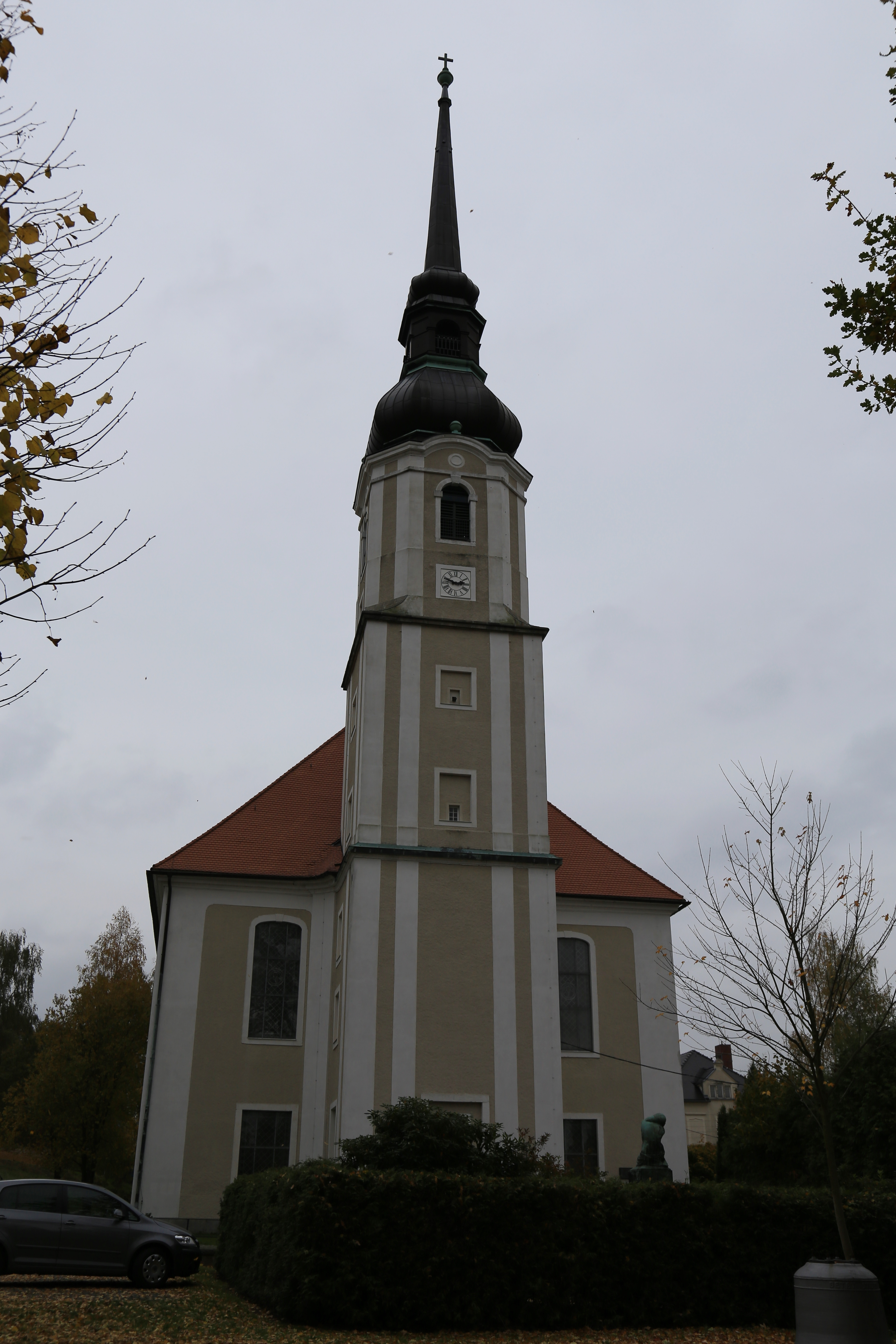 Cunewalde Kirche (3)